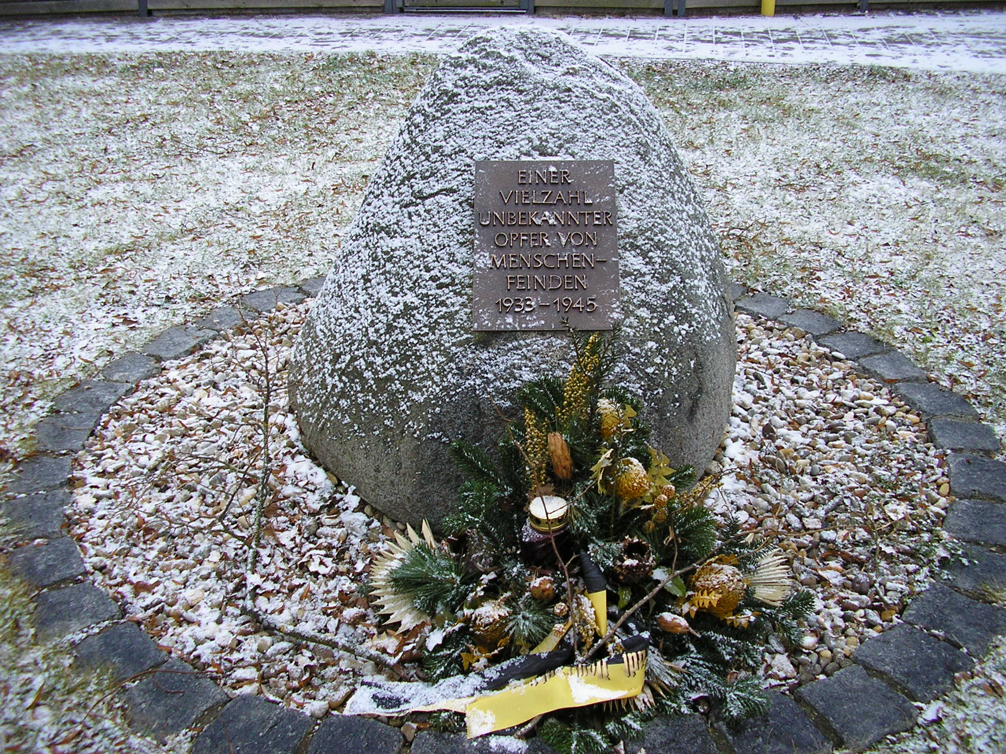 Der Gedenkstein wurde auf private Initiative hin im Jahr 2006 errichtet. Er soll an die Opfer der Nazi-Diktatur hinweisen.